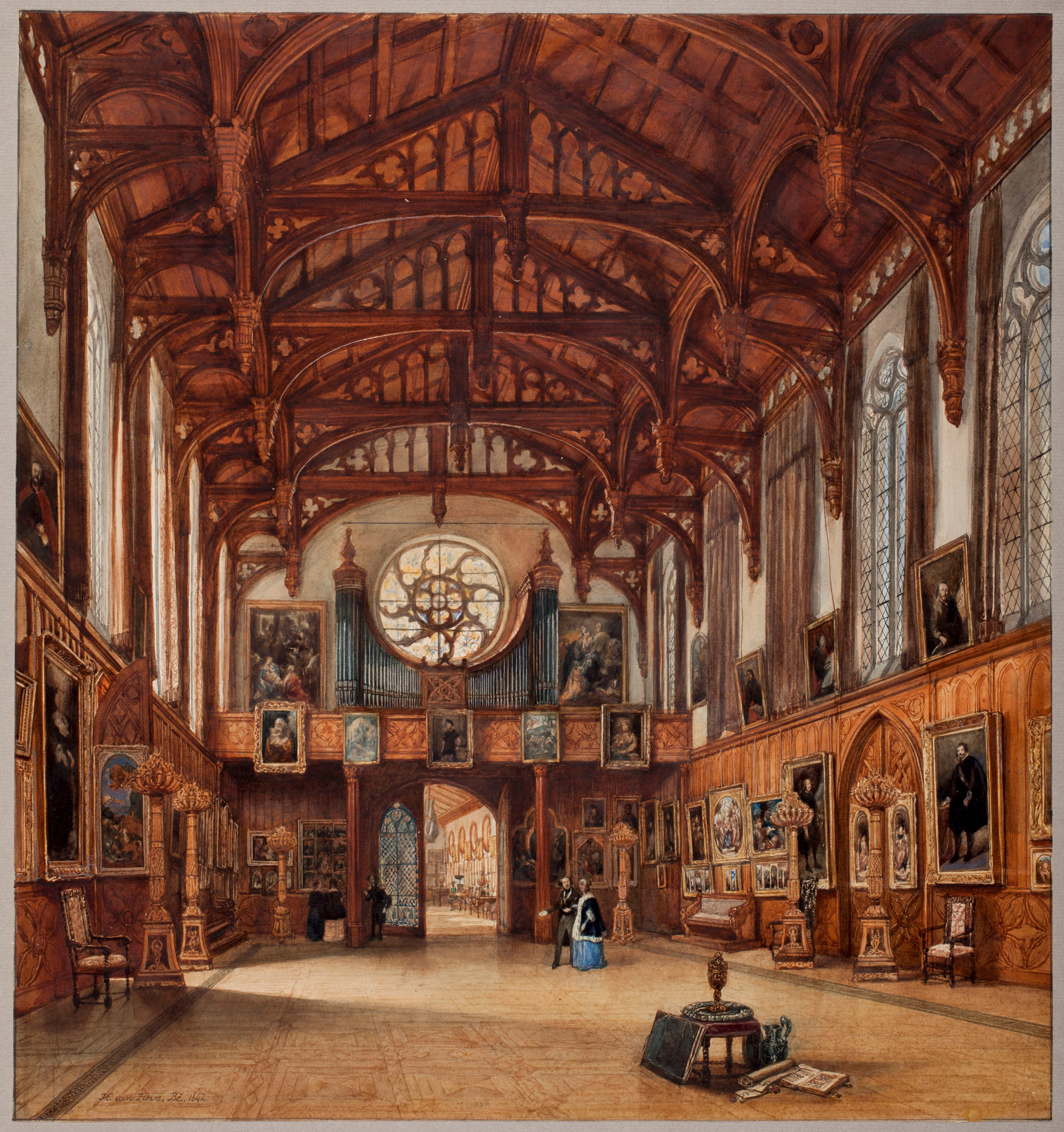 Aquarel uit 1842 van de Gotische Zaal. In 1842, niet lang na de ingebruikname van de Gotische Zaal als museumzaal en kapel, vervaardigde Huib van Hove Bz. deze aquarel met de Koning en Koningin die de inrichting bewonderen. Boven de doorgang is het Bätzorgel aangebracht. Door de hoog geplaatste ramen vangen de schilderijen een mooi licht.